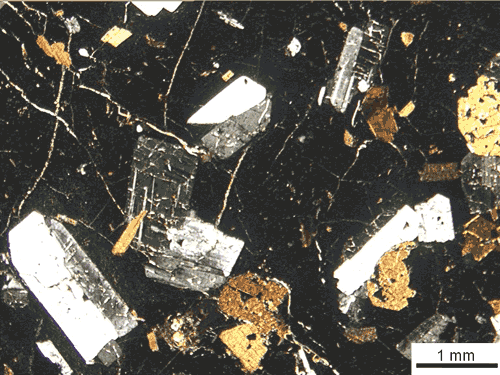 dacite. nicol incrociati